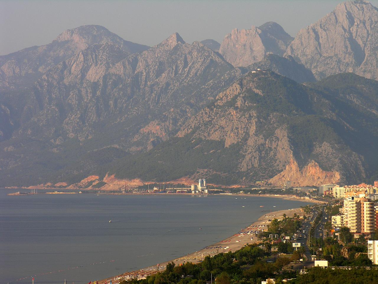 Turkey-2459